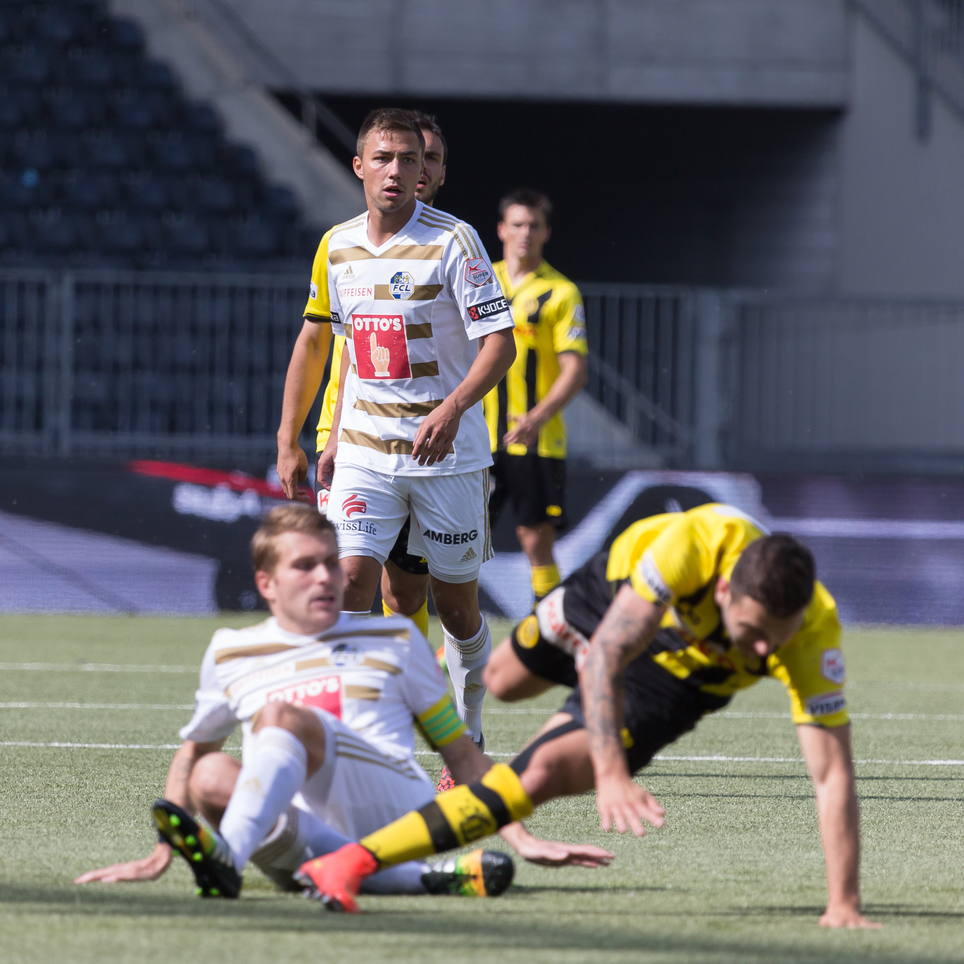 Alain Wiss beim Spiel des BSC Young Boys gegen den FC Luzern; im Vordergrund Claudio Lustenberger und Renato Steffen